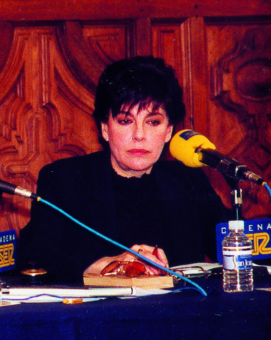 gabilondo